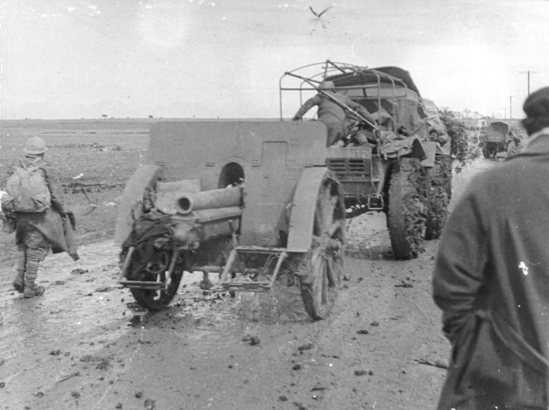 Die grosse Winterschlacht um Guadalajara Anfang März begann die grosse Offensive der nationalen Truppen auf Gudalajara, deren Hauptstoss auf der Strasse Madrid - Saragossa (Carretera de Aragon) geführt wurde. Die ausserordentlich schweren Kämpfe nahmen einen wechselnden Verlauf; das Kriegsglück, das sich im Anfang den Nationalen zuneigte, wandte sich später den Roten zu. Kälte, Hagelsturm, aufgeweichter Boden und scharfe Winde erwiesen sich oft als schlimmere Gegner als das feindliche Feuer. Die Soldaten der ersten beiden freiwilligen Divisionen lagen fünf Tage lang in Schlamm und Dreck, ohne warmes Essen. Zum ersten Male im spanischen Bürgerkrieg wurden ausschließlich motorisierte Einheiten eingesetzt. Schwere Artillerie geht in Stellung. Fot. H.G. von Studnitz